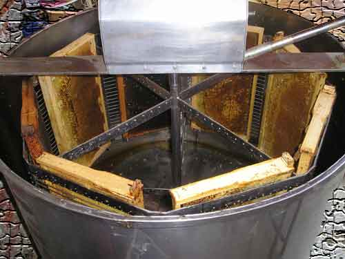 vrcaljka